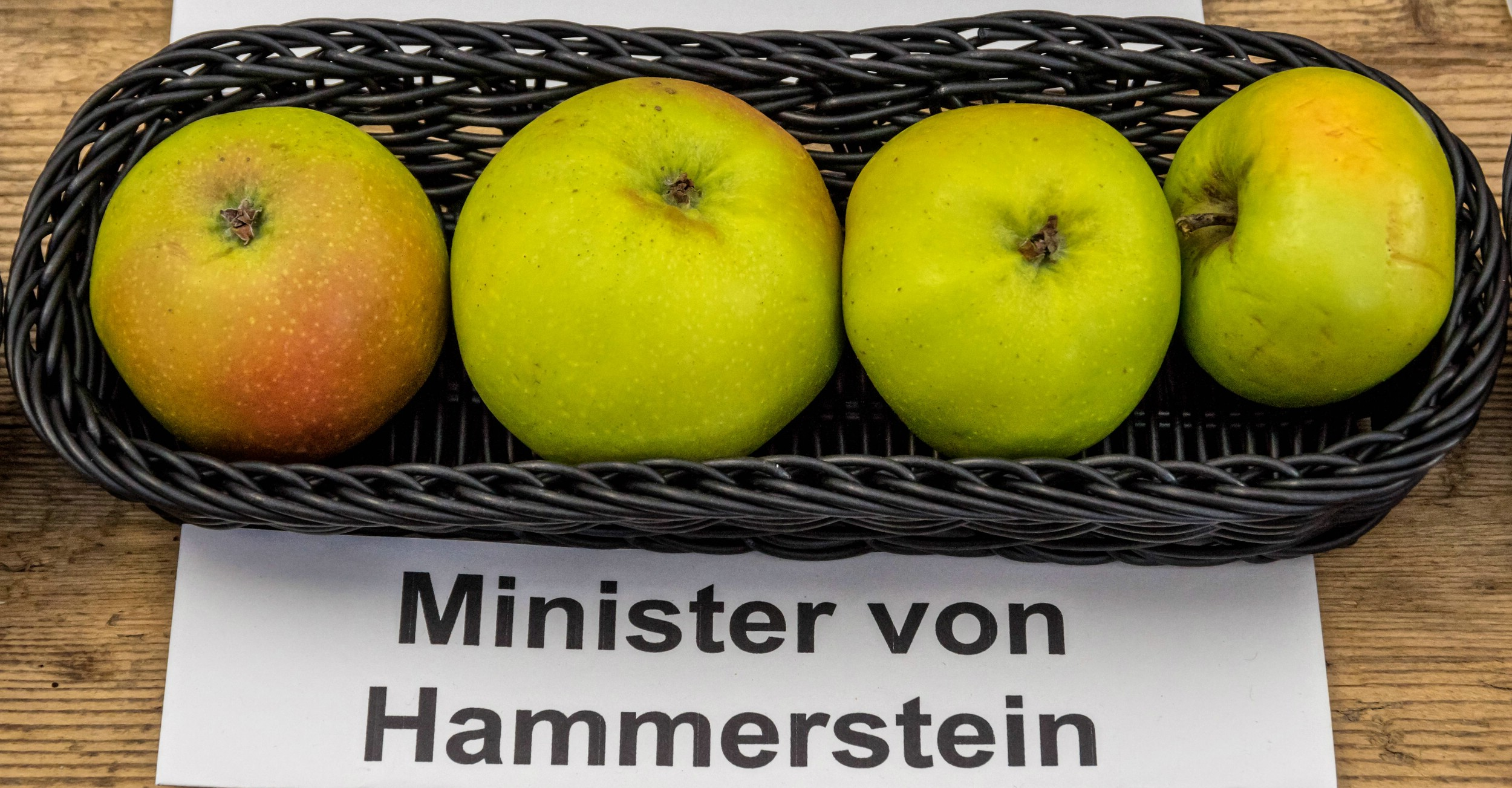 Alte Apfelsorten, von denen es im Badischen noch tragende Bäume gibt. Alle Aufnahmen au dem Oktober 2015